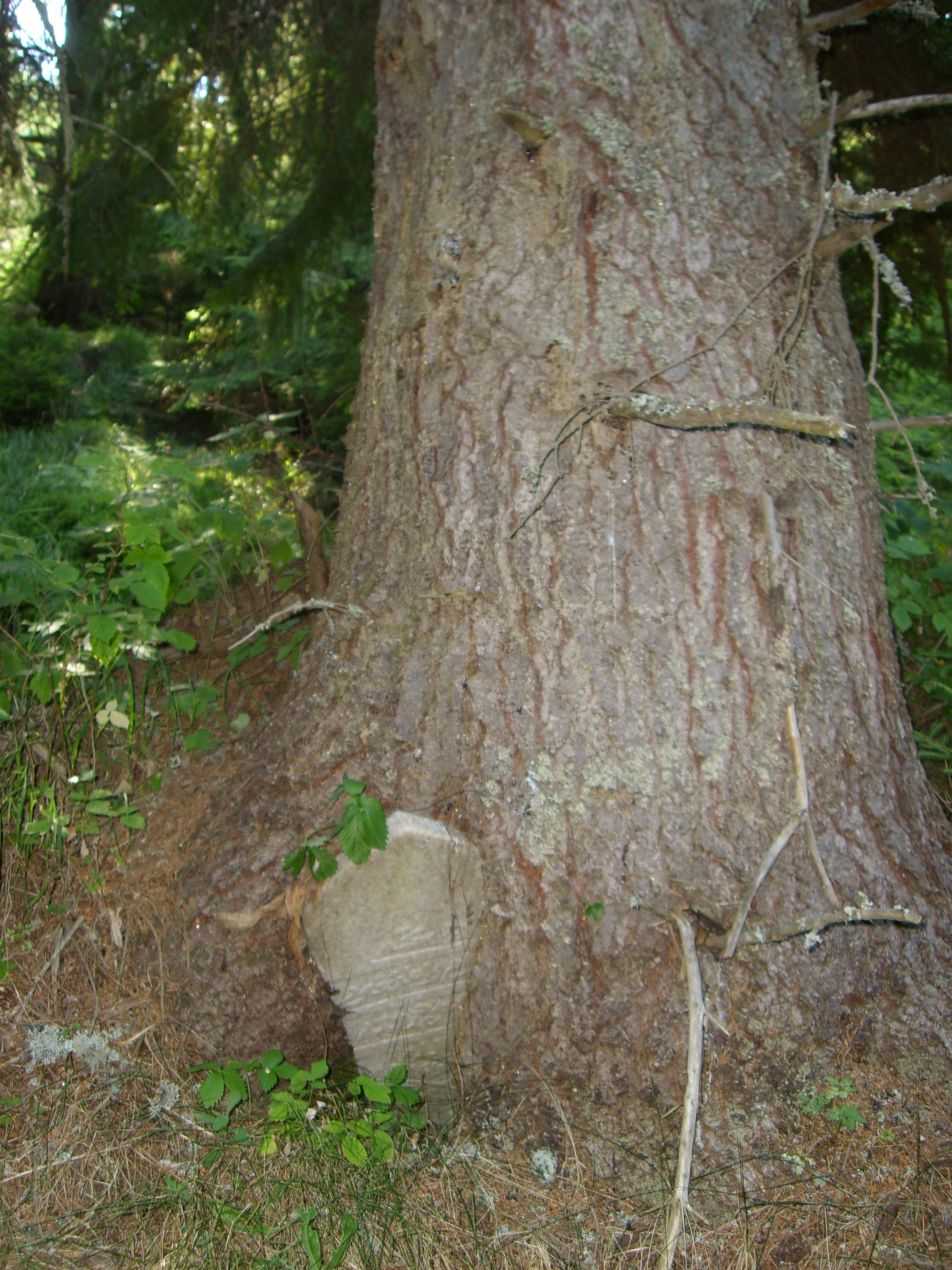 Останки от гробищен парк в опожареното село Тъмръш на Помашката република